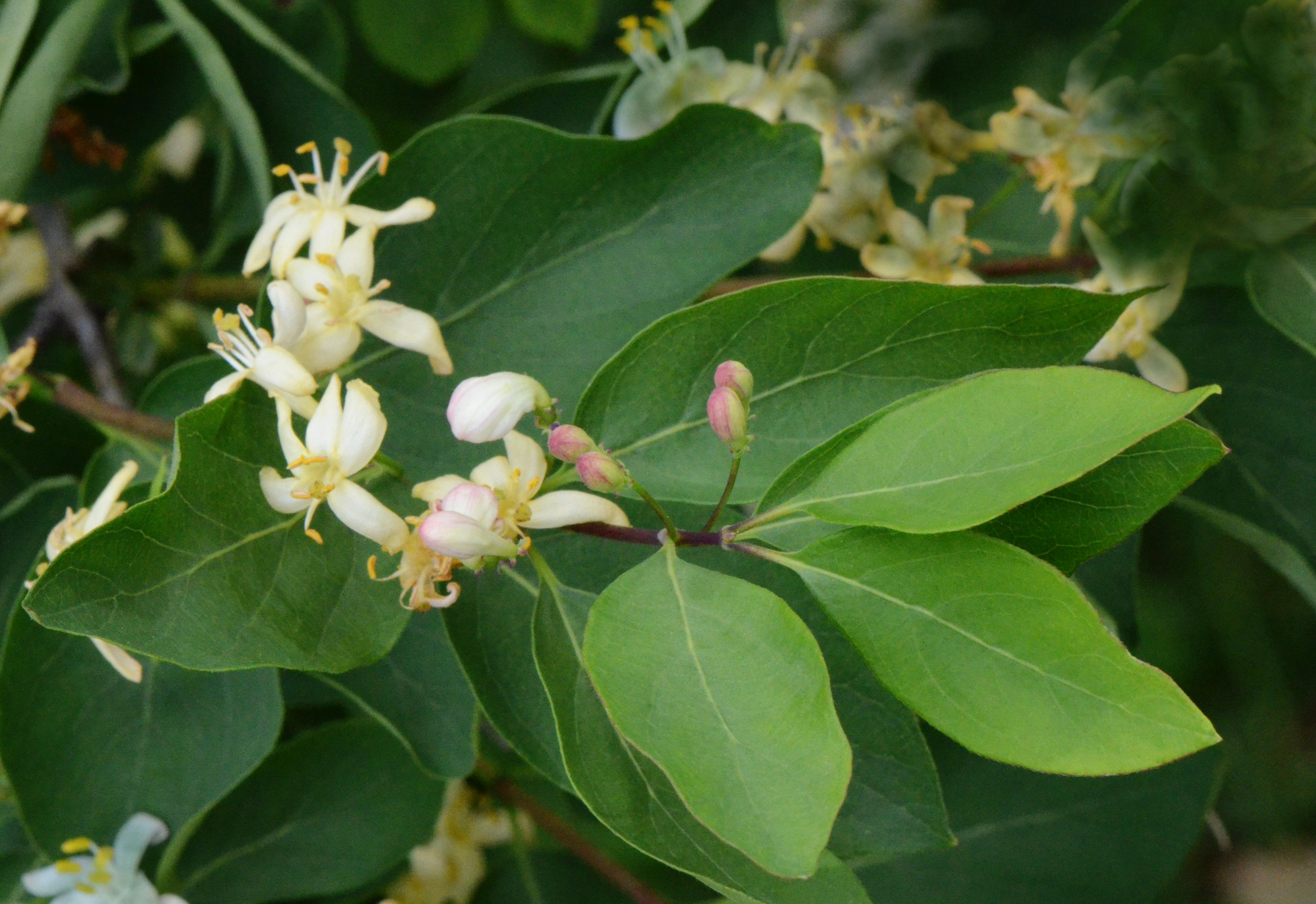 Lonicera tatarica, Jardin des Plantes de Paris